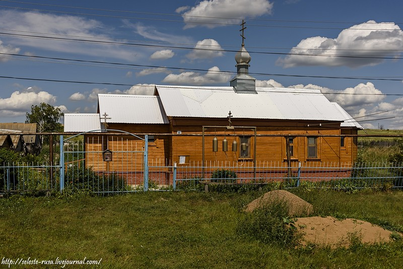 Храм во имя Казанской иконы Божией Матери в селе Богородское Кинель-Черкасского района Самарской области. Русская Православная Церковь, Самарская митрополия, Отрадненская епархия, Отрадненское благочиние. Настоятель: окормляющий священник Сергий Сташенков.